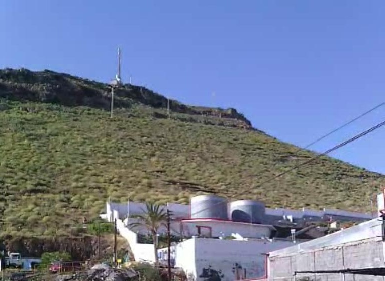 Oil Tanks am Berghang zur Versorgung des Kraftwerkes mit Öl.